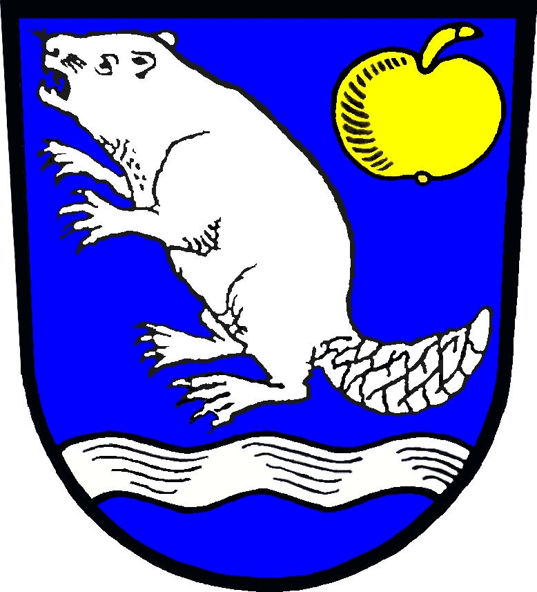 Wappen der Gemeinde Böbrach